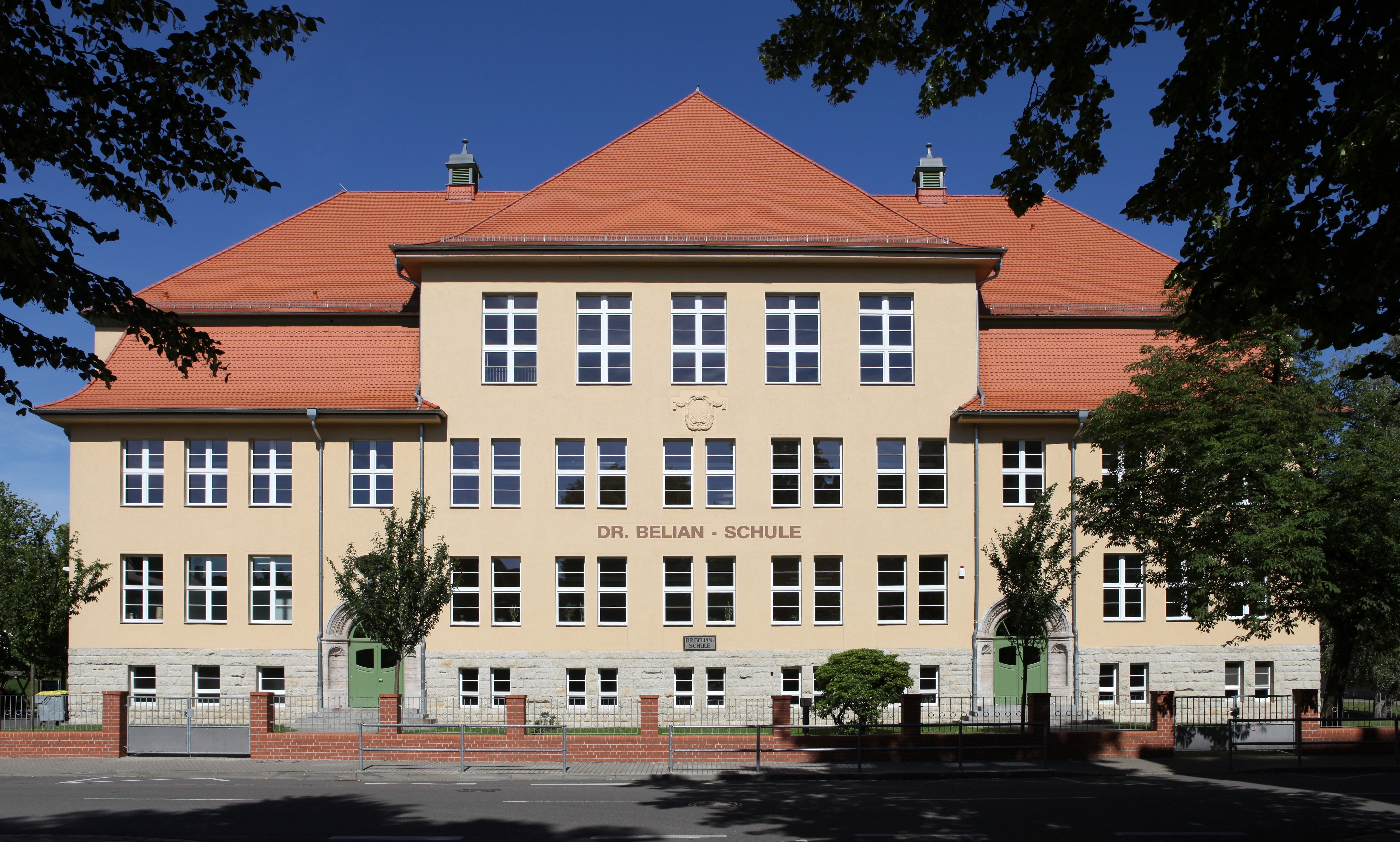 Kulturdenkmal Schule Gustav-Raute-Straße 1 in Eilenburg; Objektnummer: 08973323